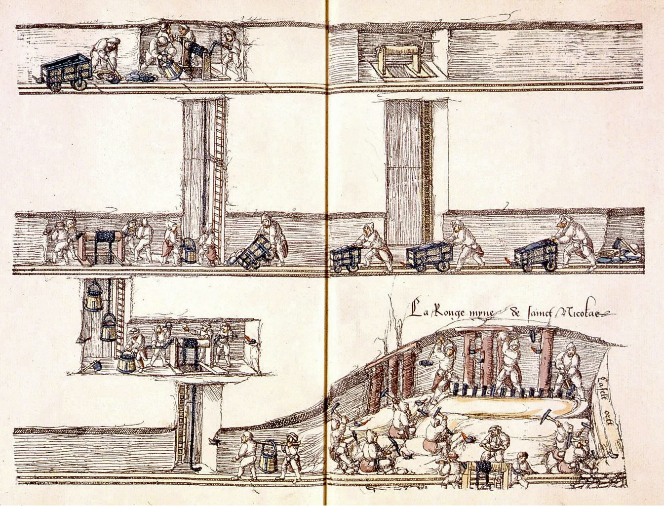 La Croix-aux-Mines. Les galeries de la Mine Saint-Nicolas, in Revue Lorraine Illustrée (Nancy). Bibliothèque nationale et universitaire de Strasbourg